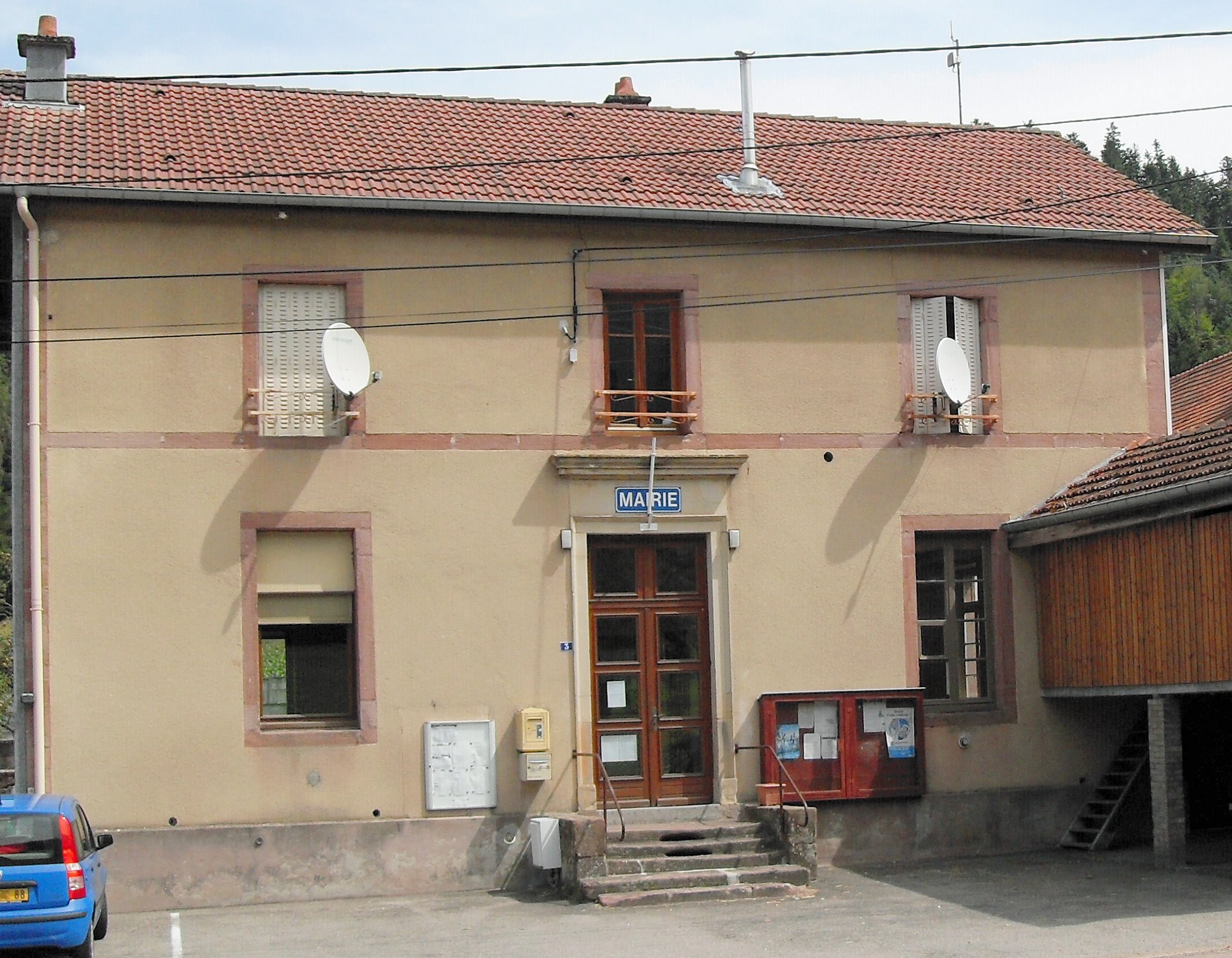 L'ancienne mairie de Saint-Jean-du-Marché, commune La Neuveville-devant-Lépanges